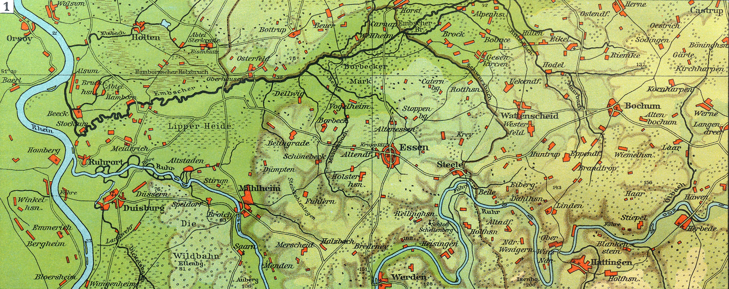 Deutsche Landschaft und Mensch, Das Rheinisch-westfälische Industriegebiet vor 100 Jahren (1830) This is a part of an old atlas. It does not represent the current situation.